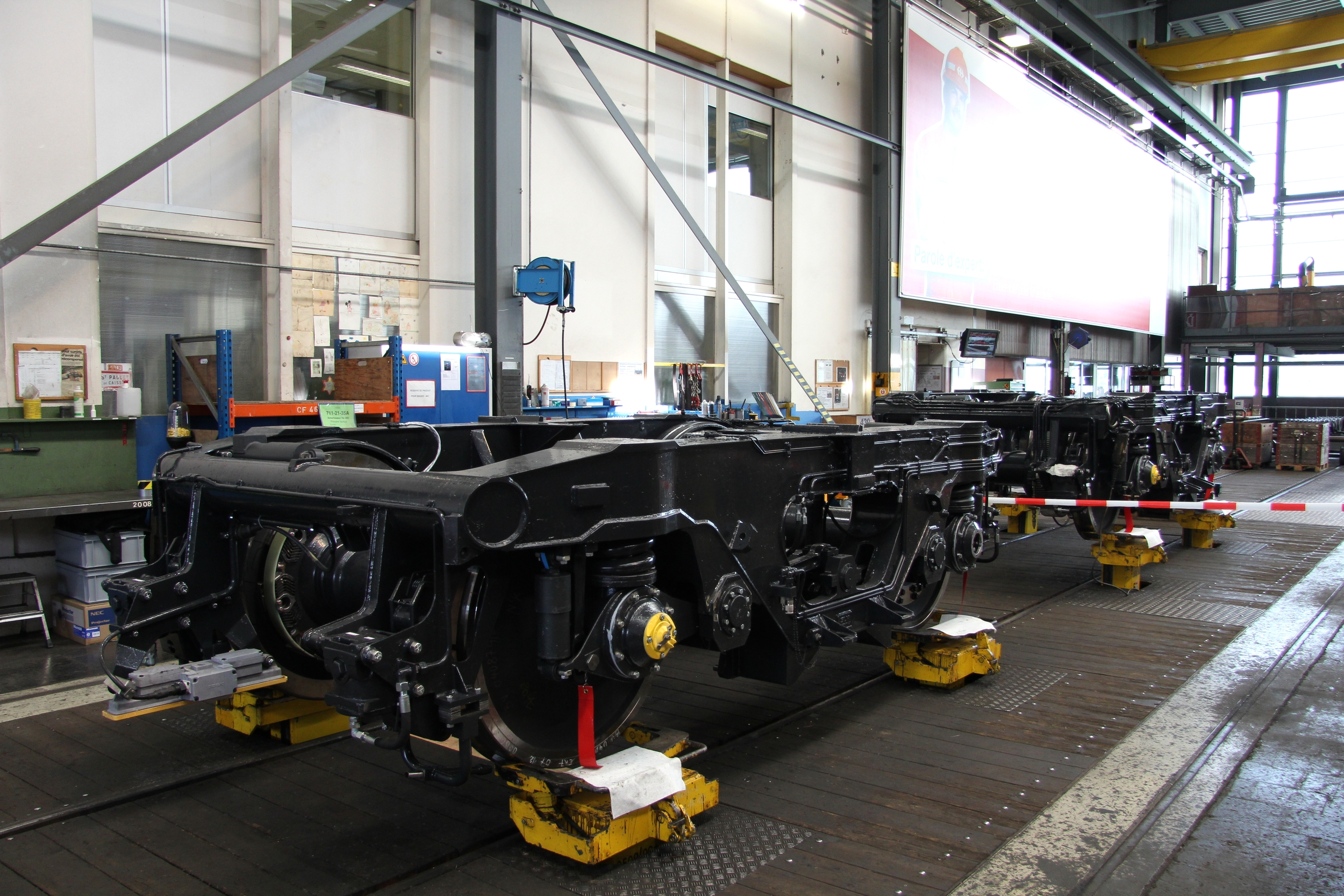 Bogies de Re 460 aux Ateliers industriels CFF d'Yverdon-les-Bains.